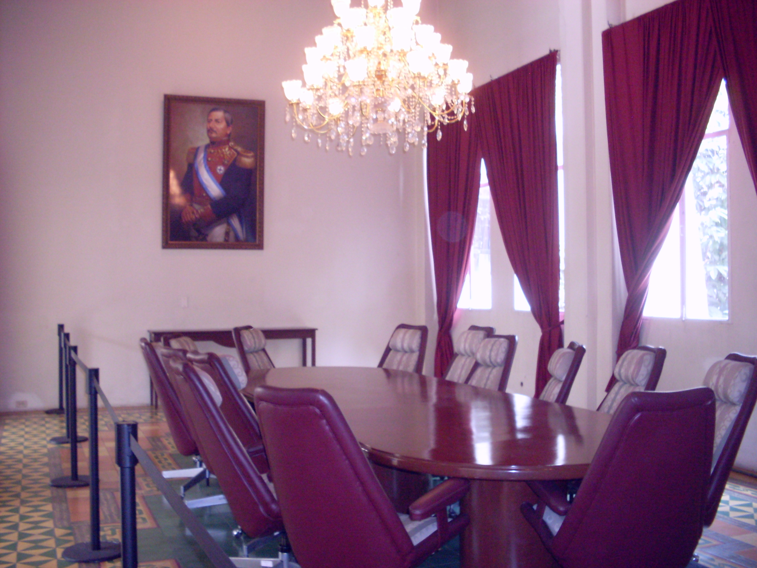 Salón Gerardo Barrios con una pintura del militar en la ex casa presidencial de El Salvador.